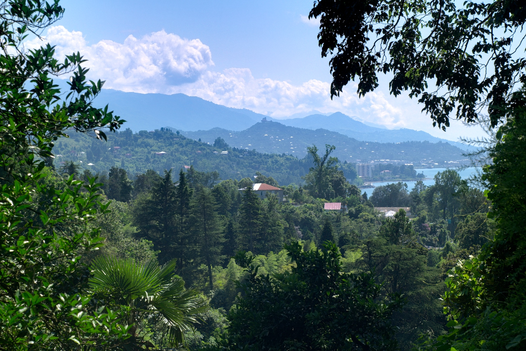 Makhinjauri